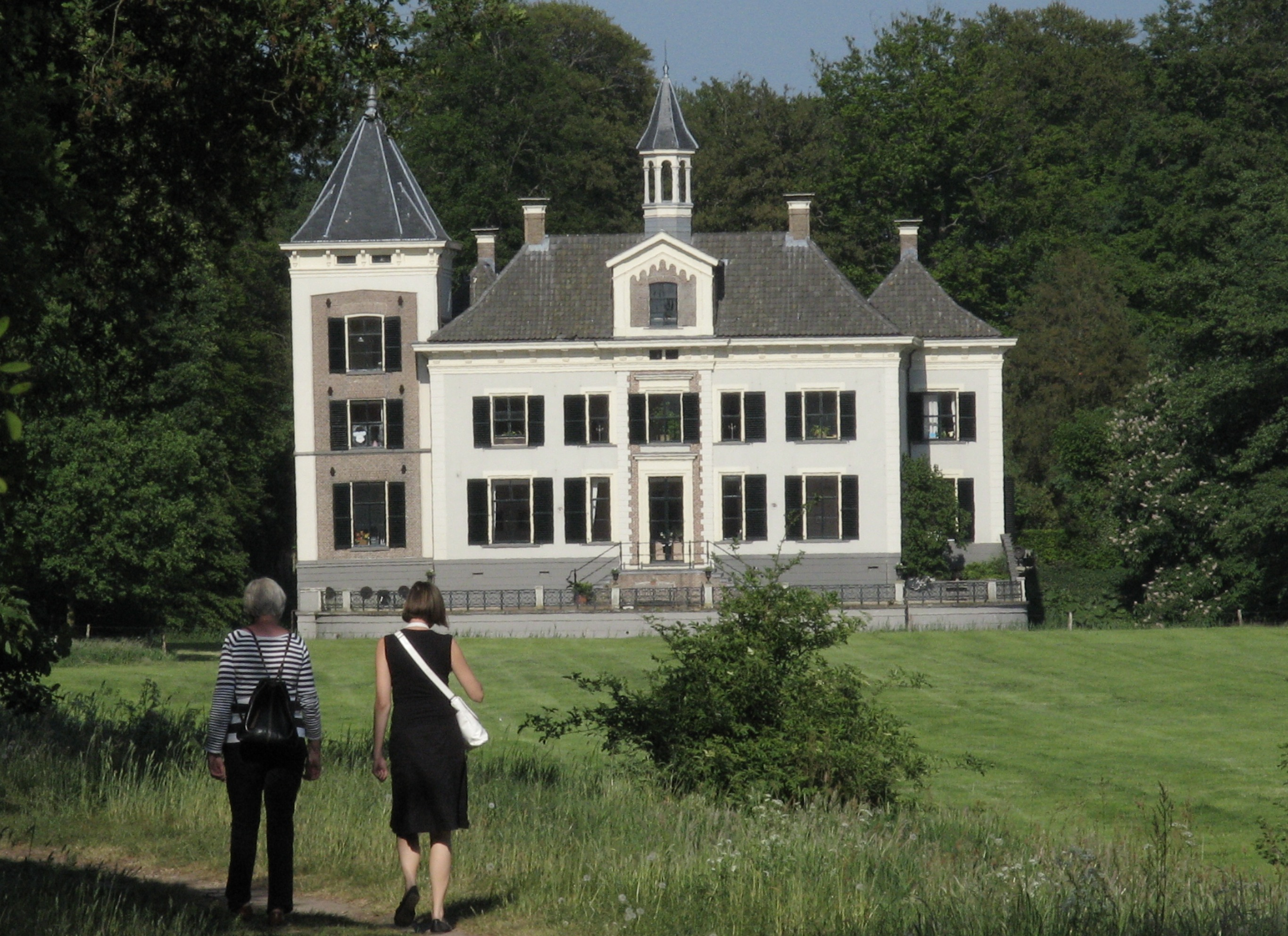 House De Haere near Olst